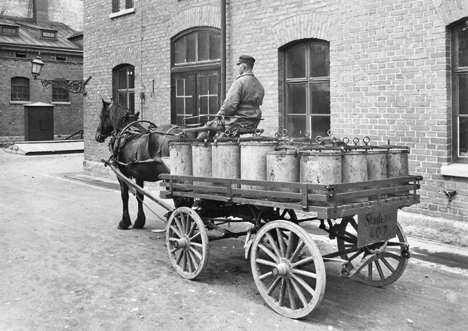 Latrinhämtningsvagn vid Västra renhållningsstationen i Vasastaden